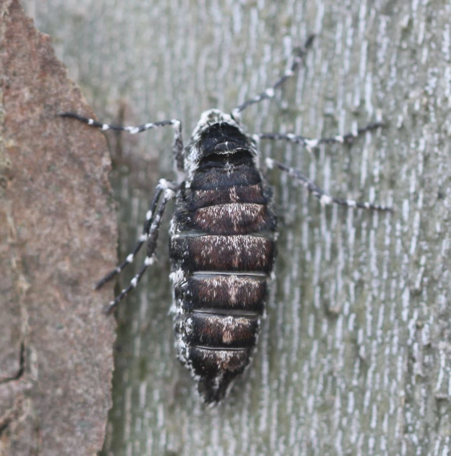 Weibchen des Schneespanners (Phigalia pilosaria) an einem Platanenstamm in Walldorf/Baden am 31. Januar 2020